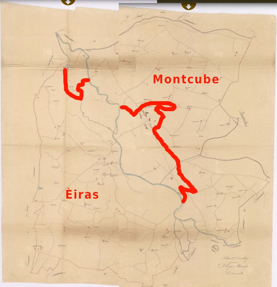 Mapa de la fusion de las comunas d'Èiras e Montcube.